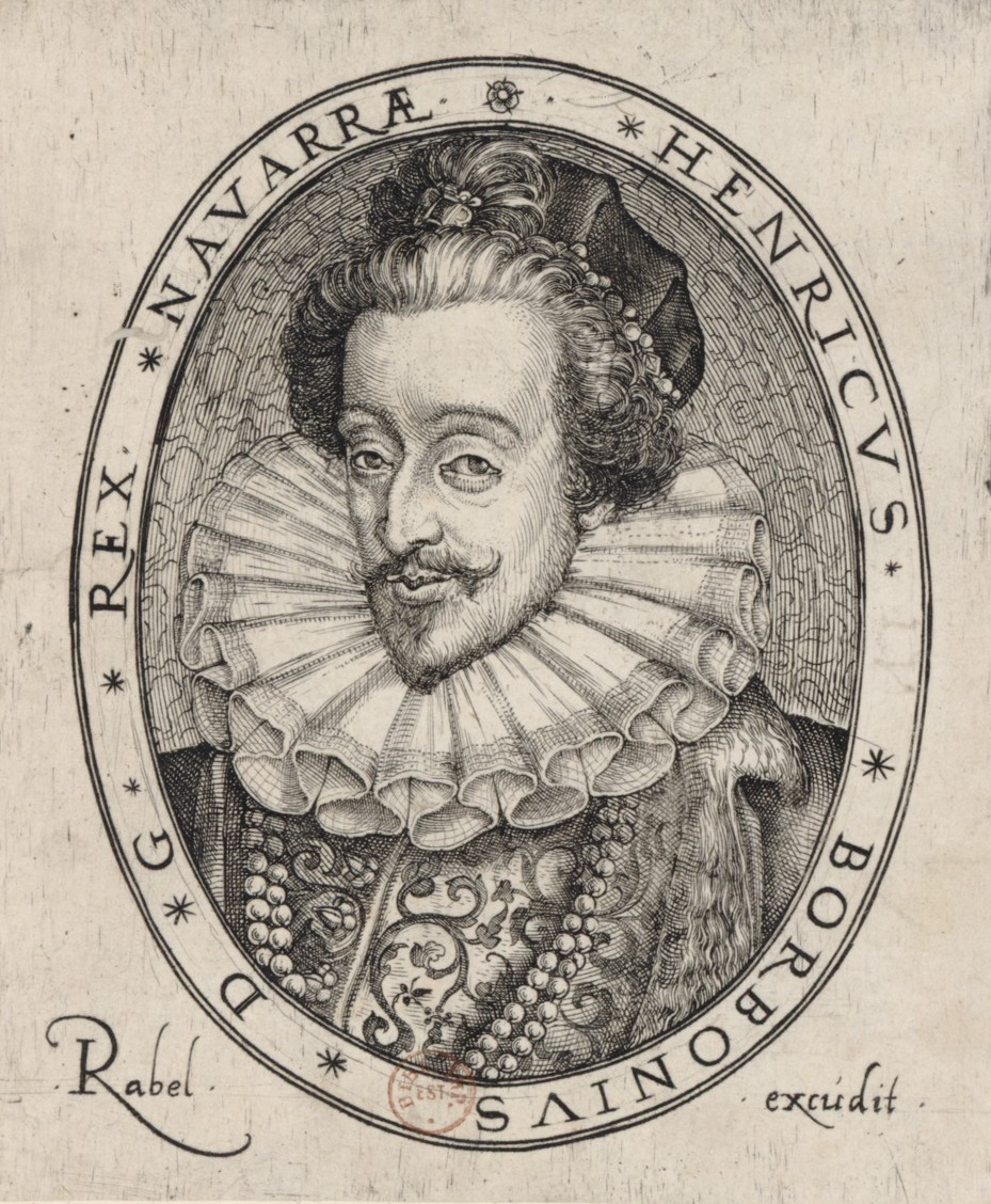 Henri III, roi de Navarre. Gravure de Jean Rabel représentant le futur Henri IV, roi de France, 1584.